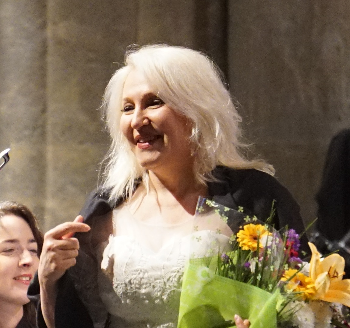 lors des Flâneries musicales 2016, Nona javakhidze en concert à la basilique St-Remi.